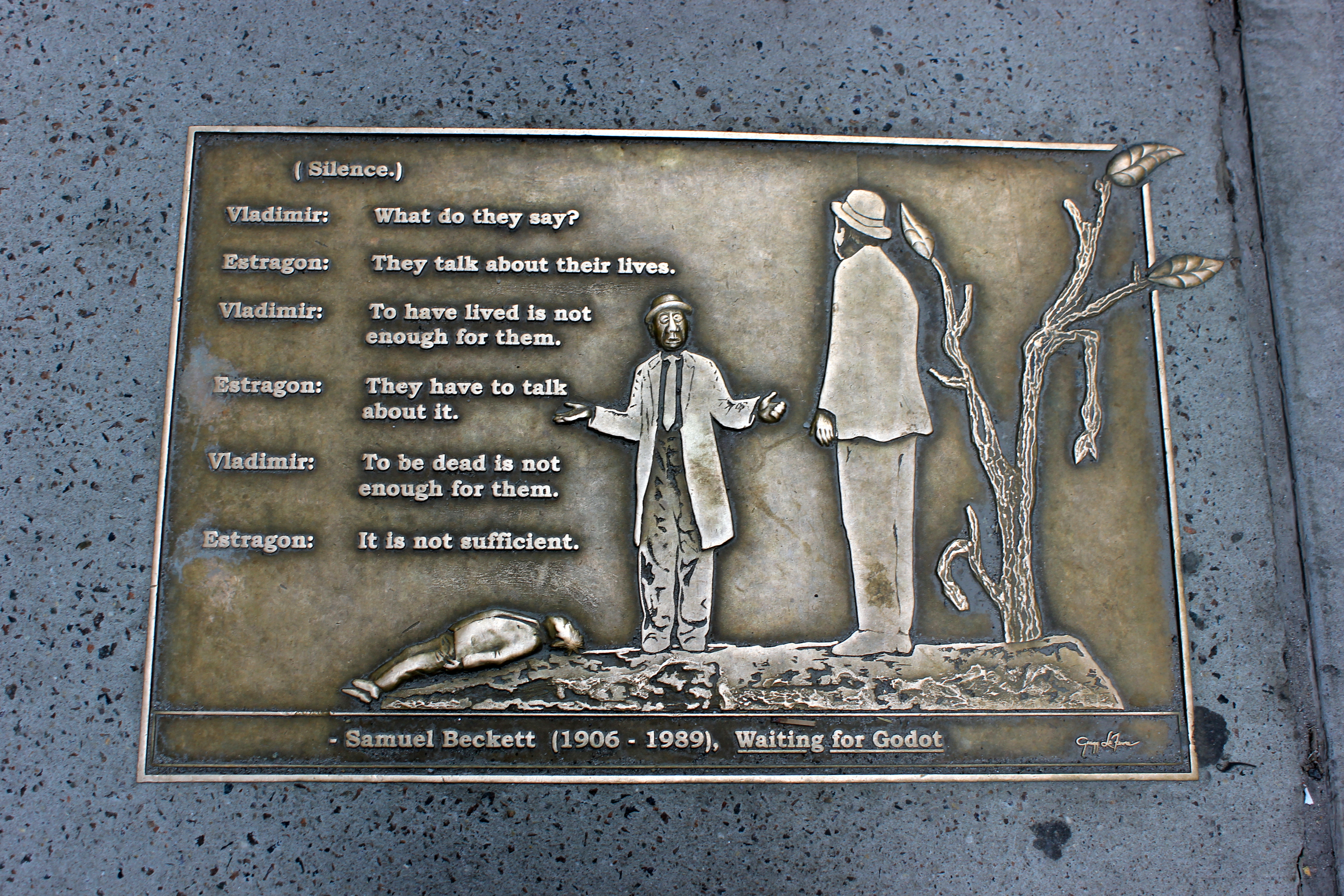 Library Walk New City